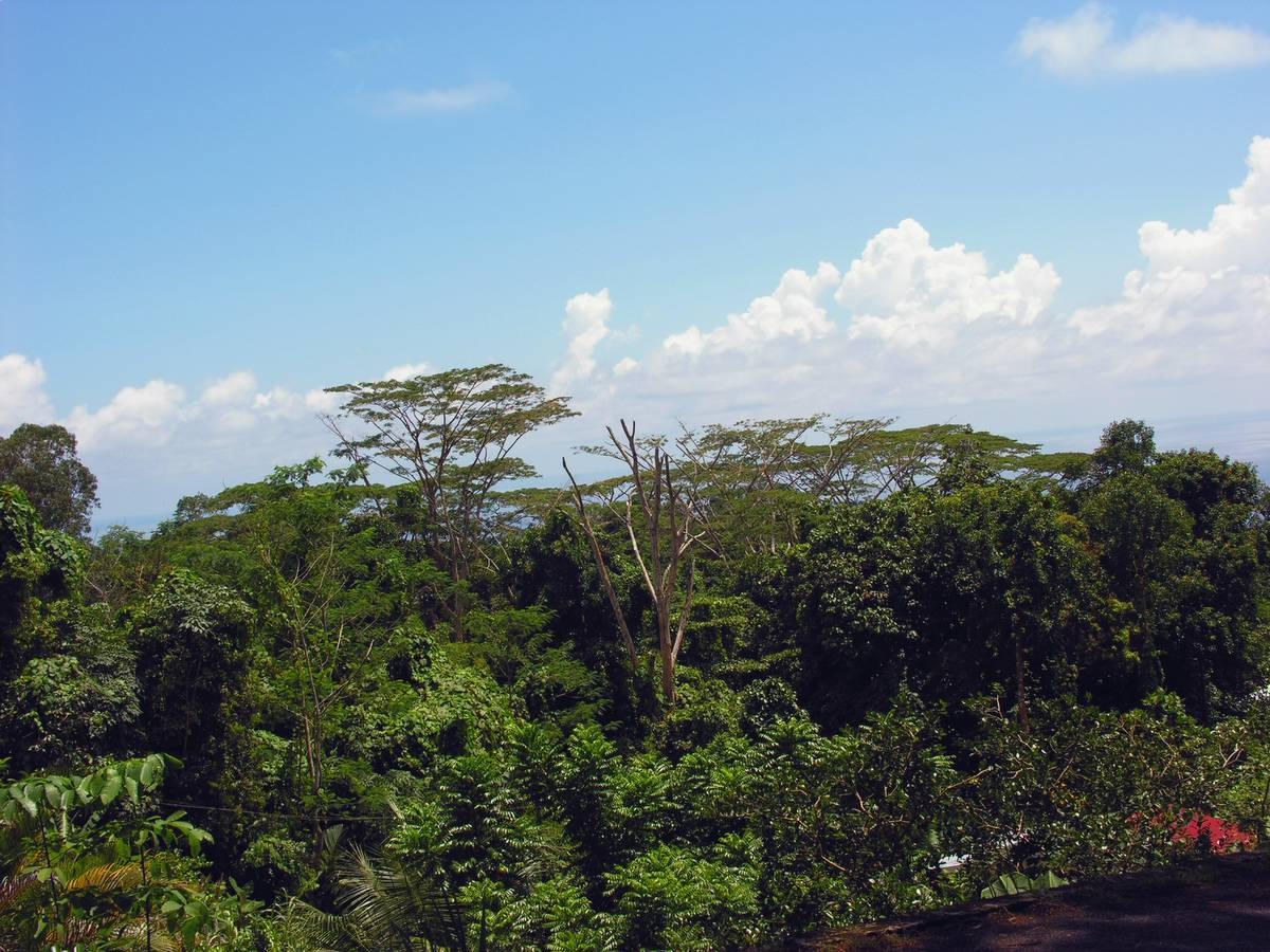 Seychelles, Mahé Island